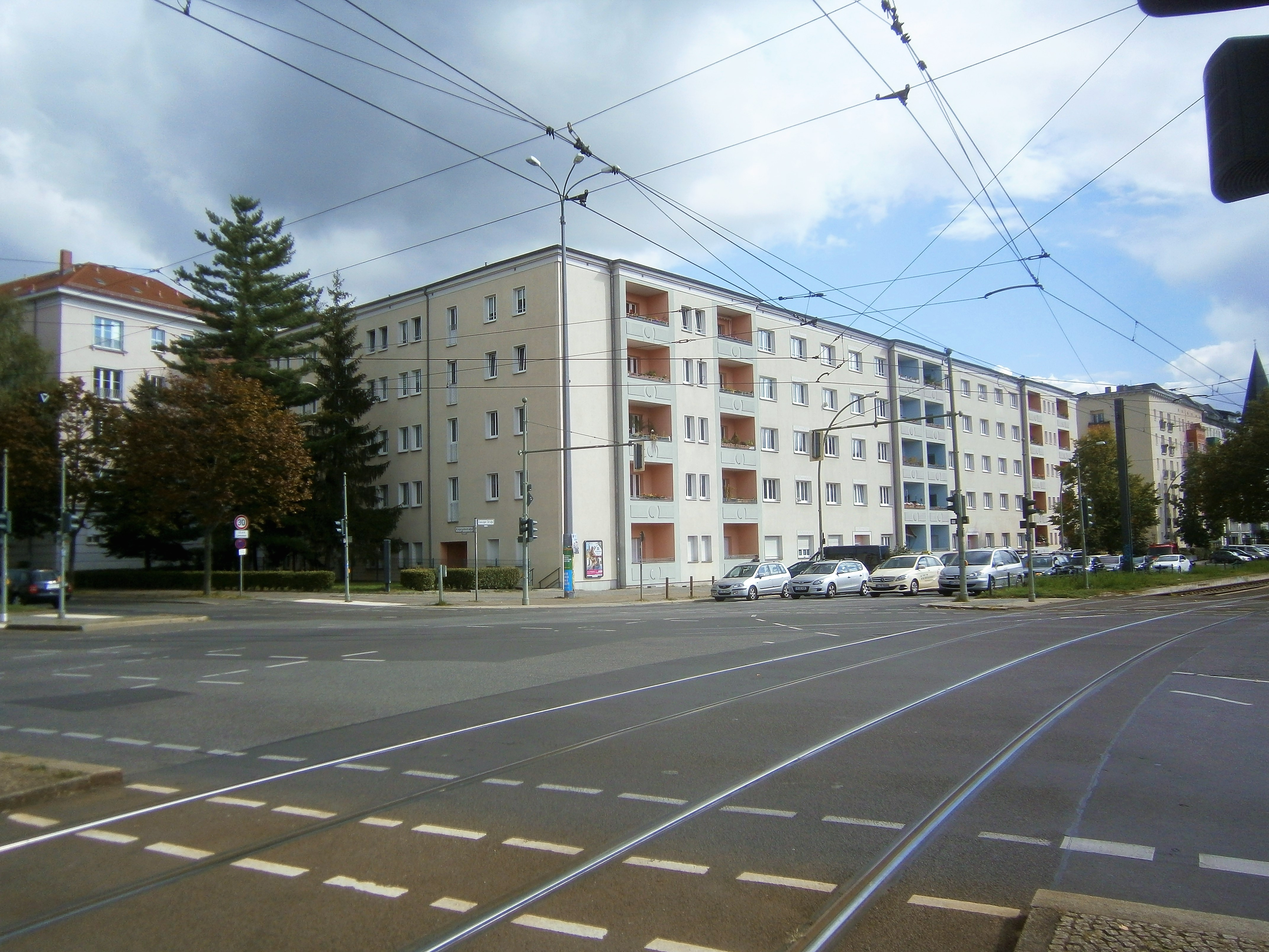 Die Kniprodestraße ist ein Verkehrszug im Berliner Bezirk Pankow, Ortsteil Prenzlauer Berg mit Grundstückszählung in Hufeisen. Bild:Danziger Straße von der Knuprode-Straße Kreuzung aus nach Osten.